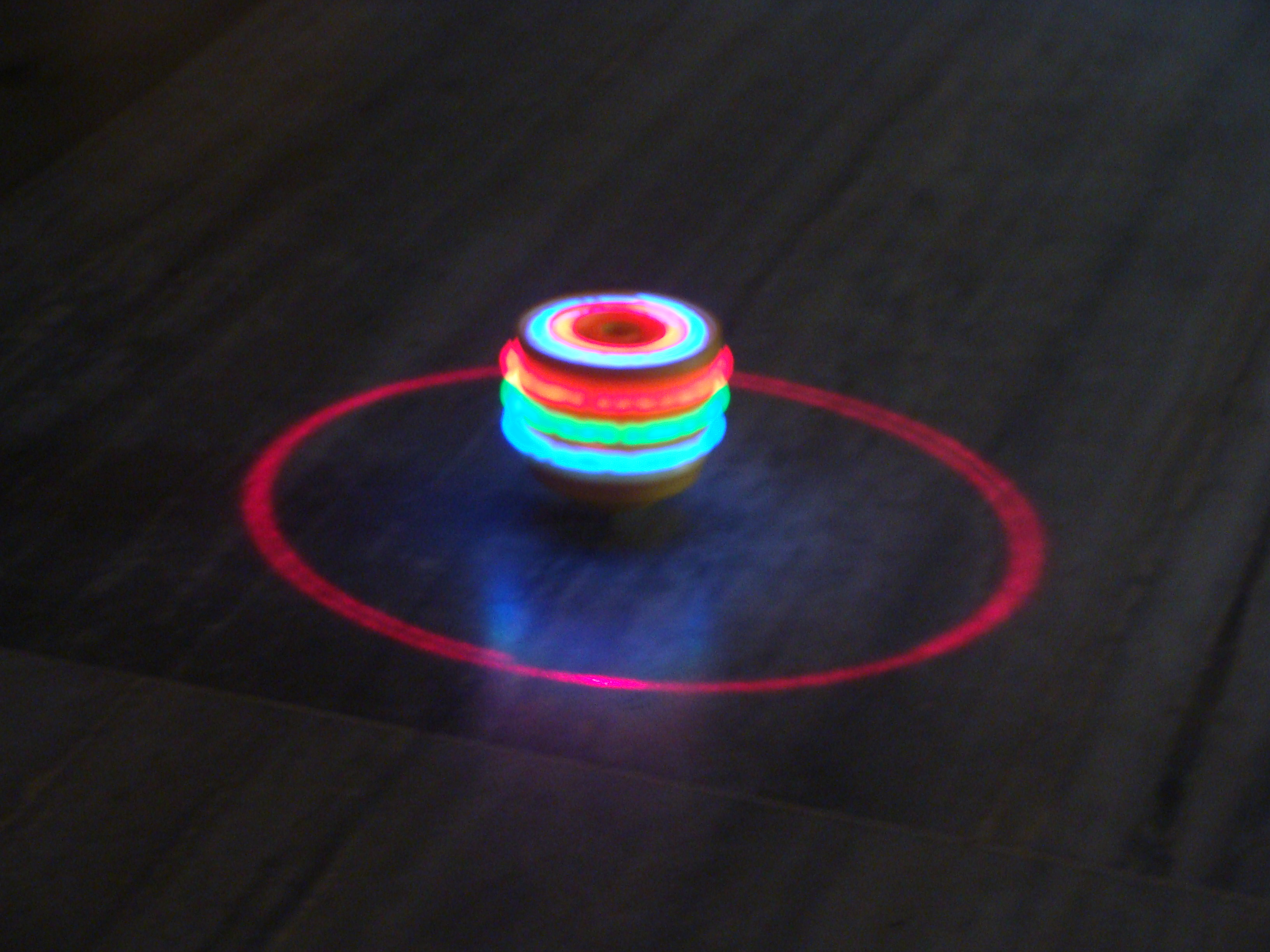 Lazer top